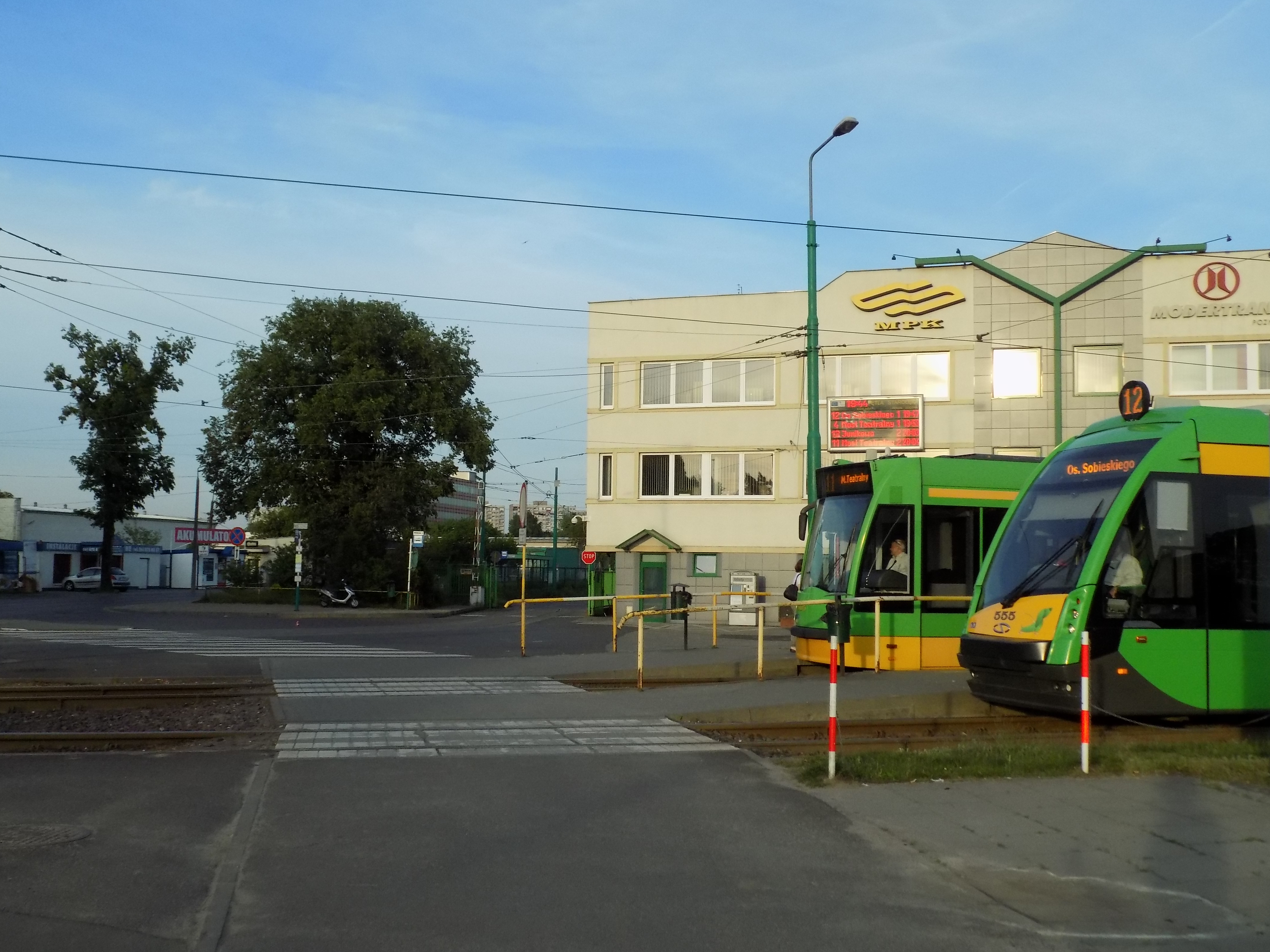 Pętla końcowa tramwajowa na Starołęce. Widok na wyjazd ze zajezdni na ulicy Fortecznej w Poznaniu.